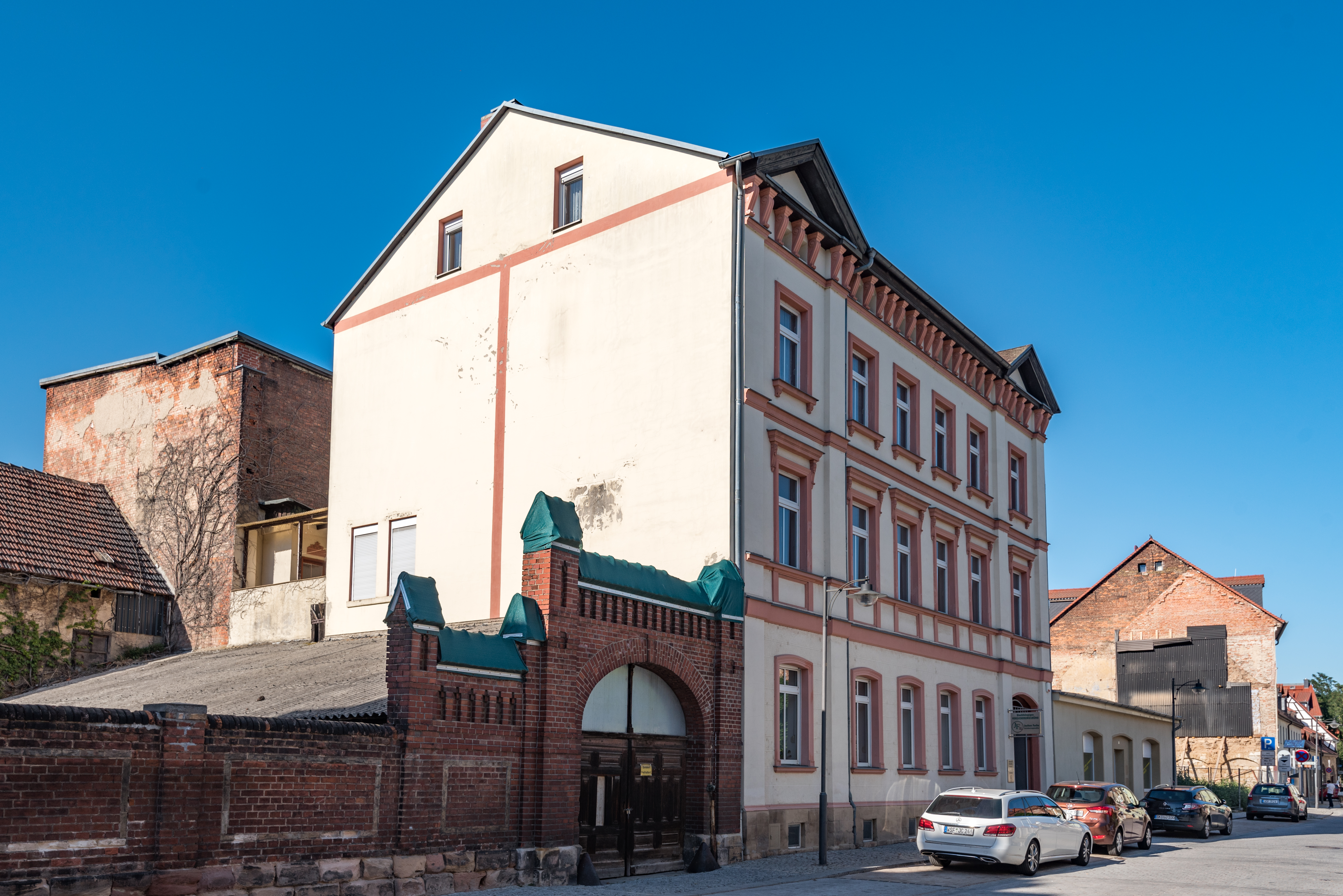 Weißenfels, Große Kalandstraße 23